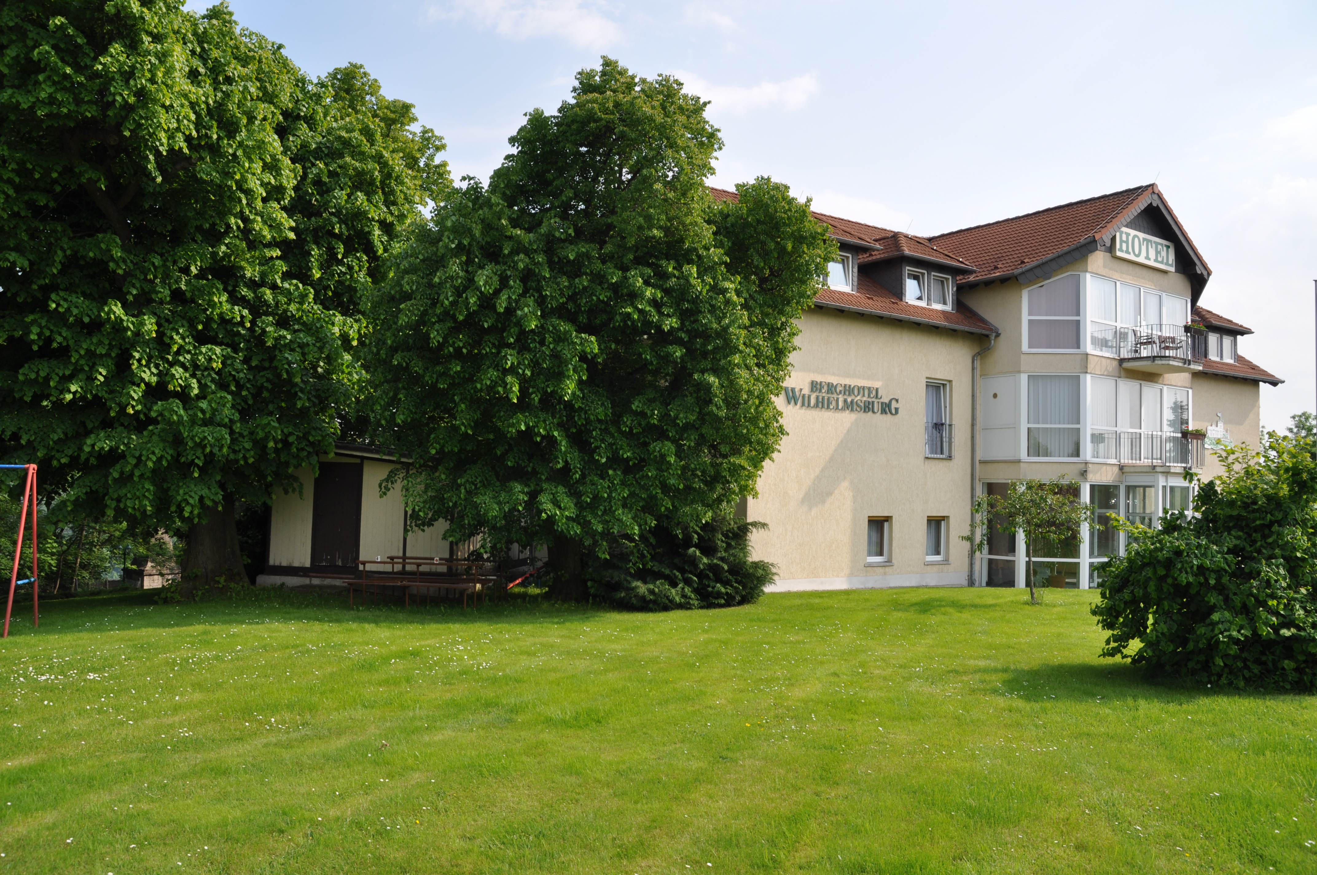 Berghotel Wilhelmsburg in Bad Kösen